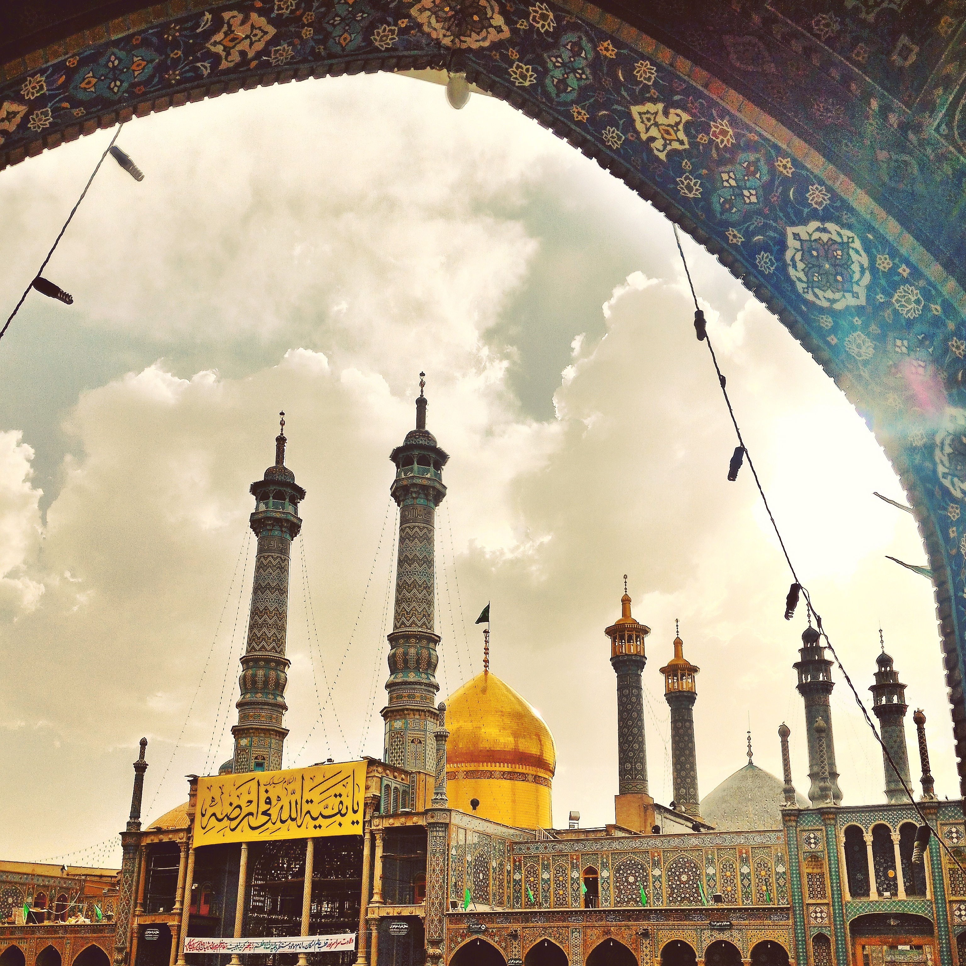 حرم فاطمه معصومه گنبد حرم حضرت فاطمه معصومه علیها سلام